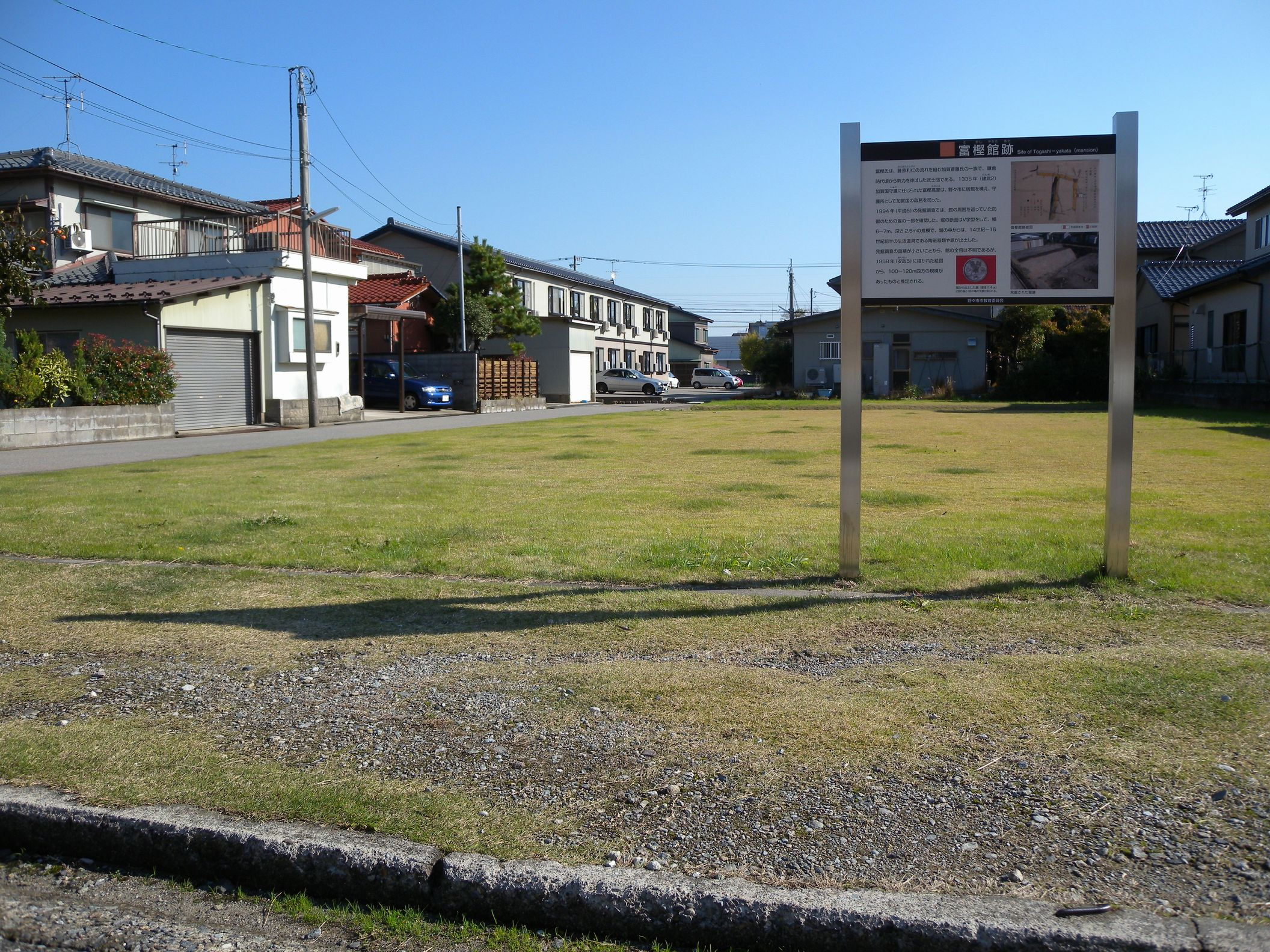 守護職冨樫氏の本館跡